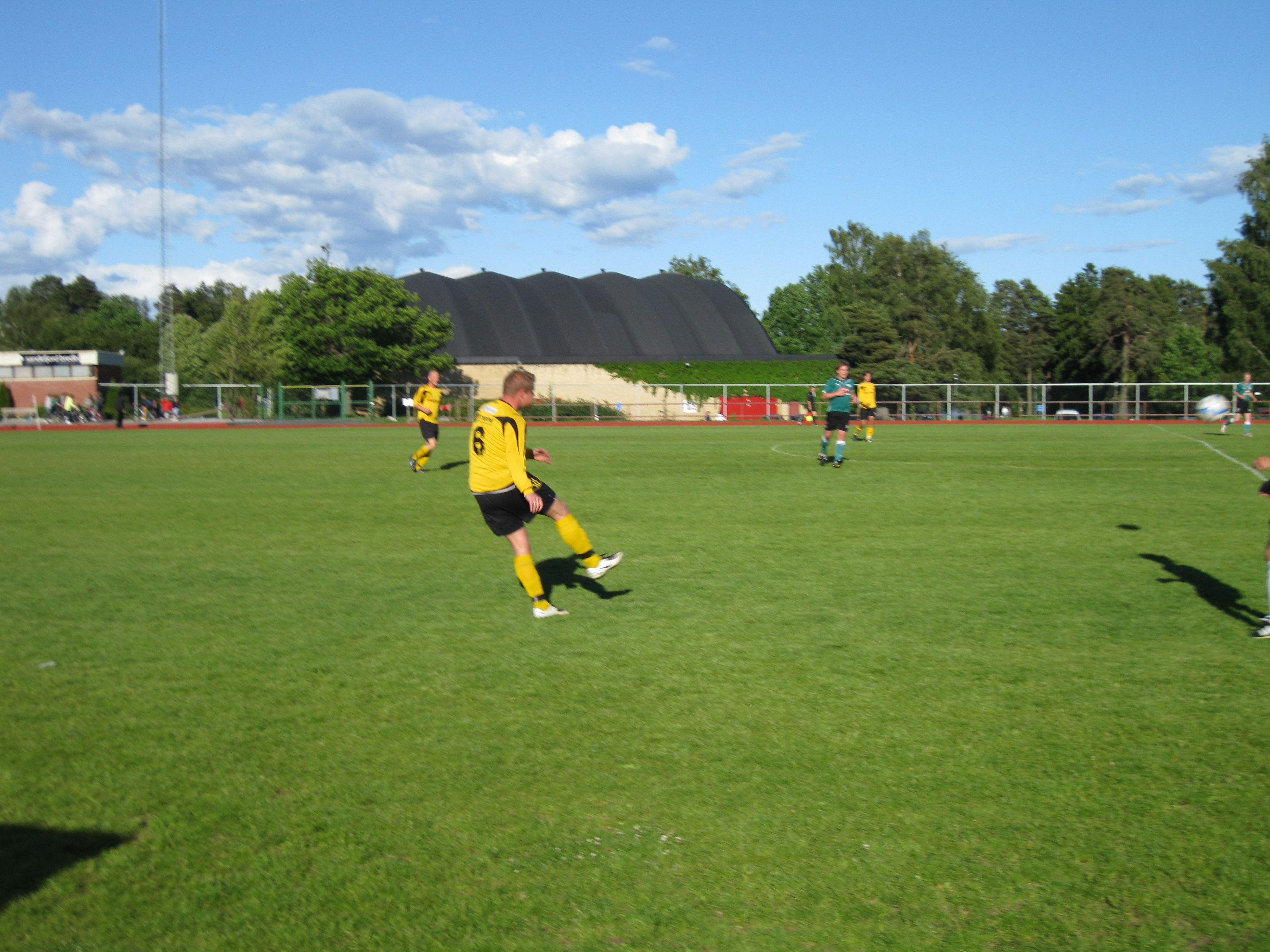 Sandefjord Ballklubb-Stokke på Storstadion 2009